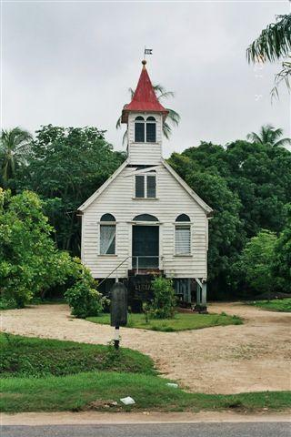 eigen foto